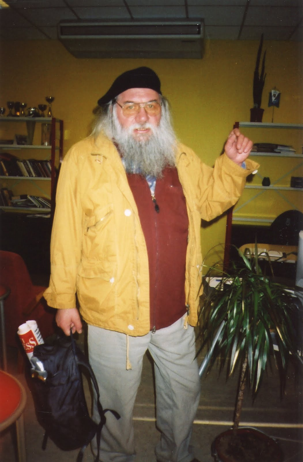 Ott Arder Eesti Päevalehe toimetuses. 2004. aasta kevad.